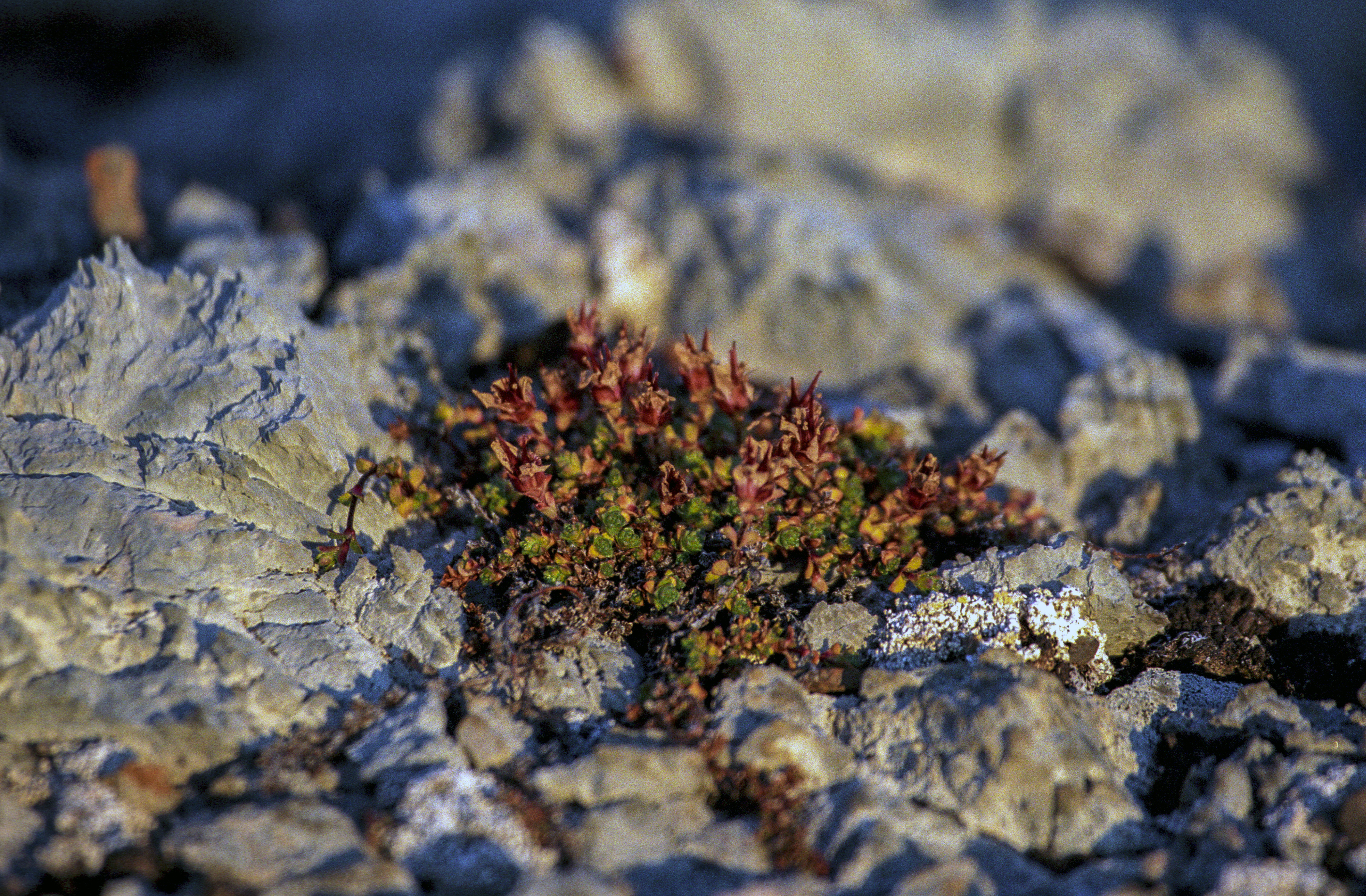 Svalbard, Nordaustlandet